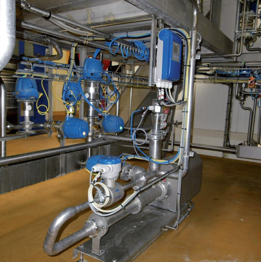 Оснащение молочного завода электромагнитными расходомерами